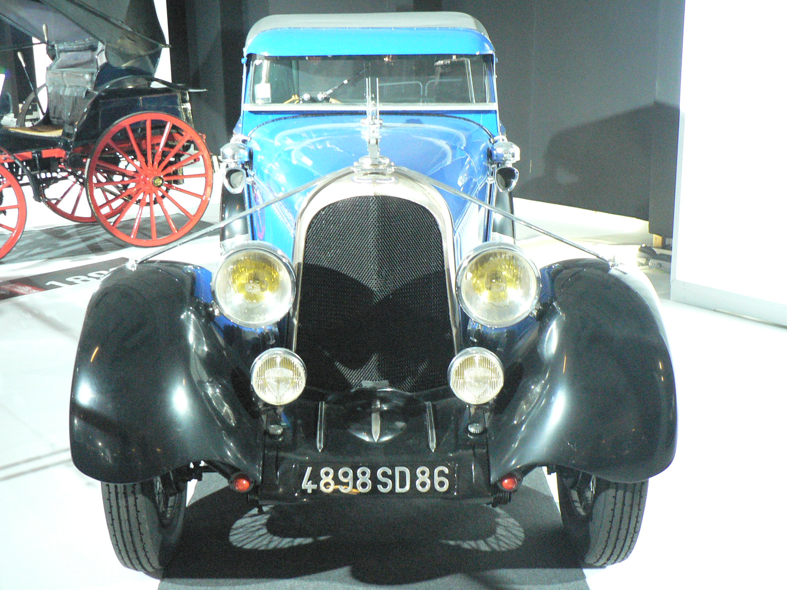 Mondial de l automobile de Paris (October 2006)